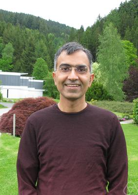 Foto di Sanjeev Arora